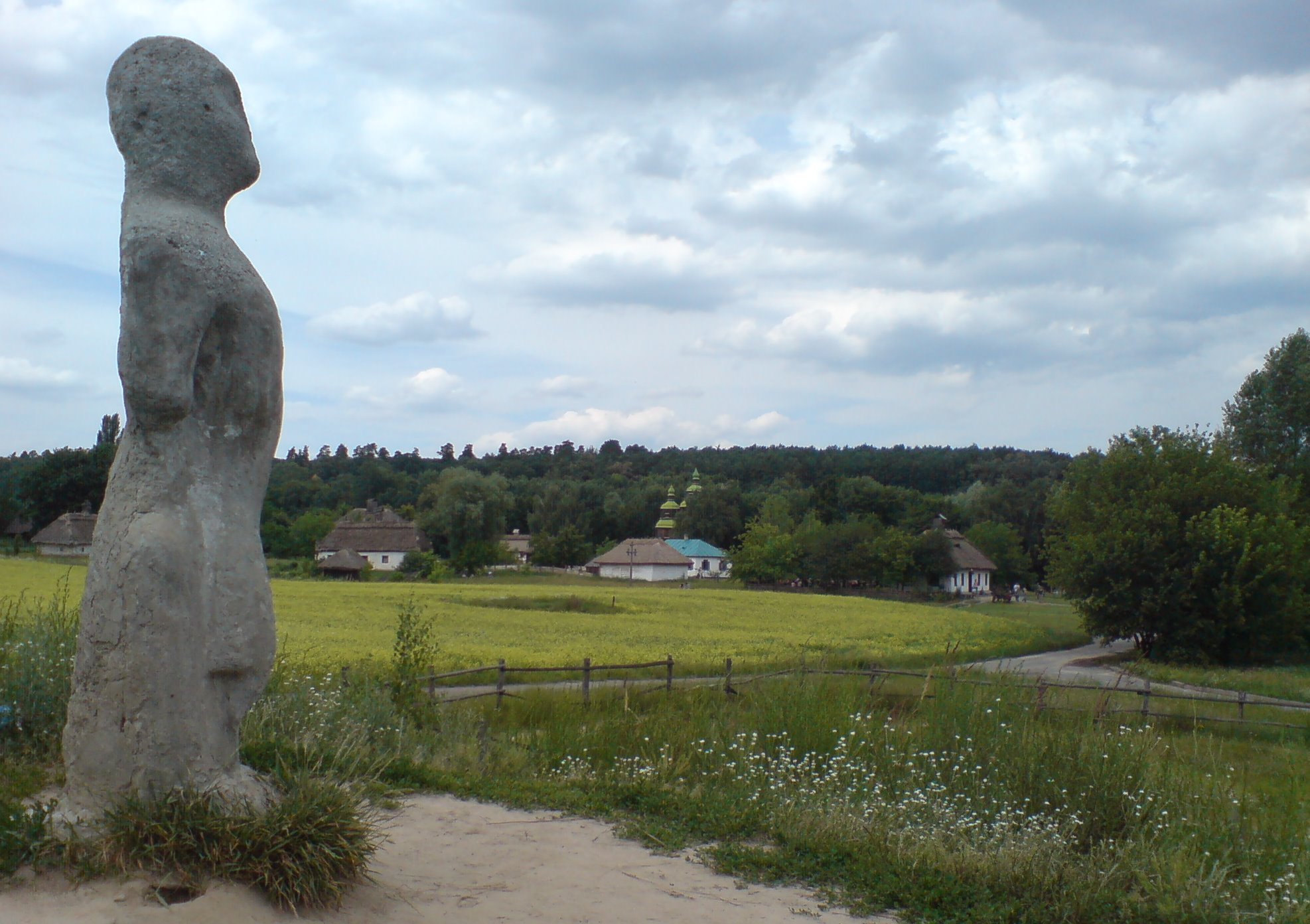 Pyrogiv open-air museum in Kiev: stone idol